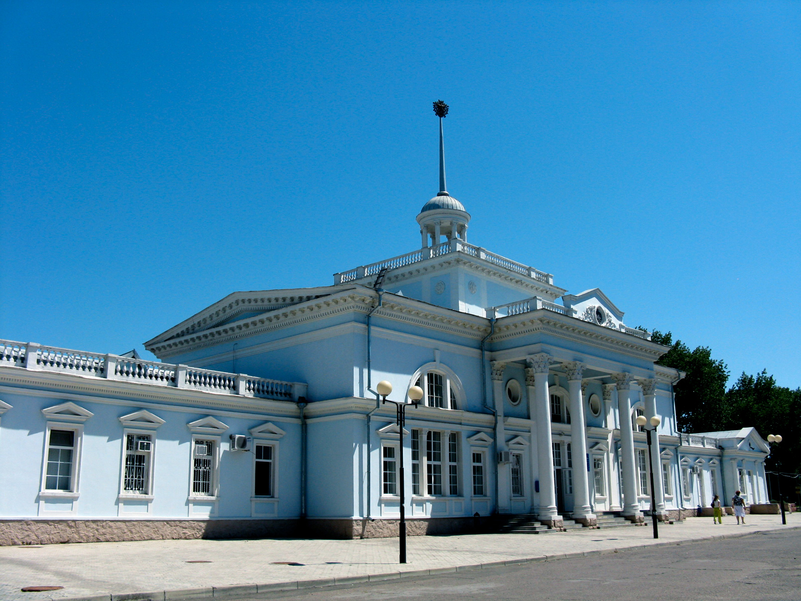 здание вокзала в Ейске (Краснодарский край); train railway station in Yeysk (Ejsk, Eisk) (Krasnodar Krai, Russia)